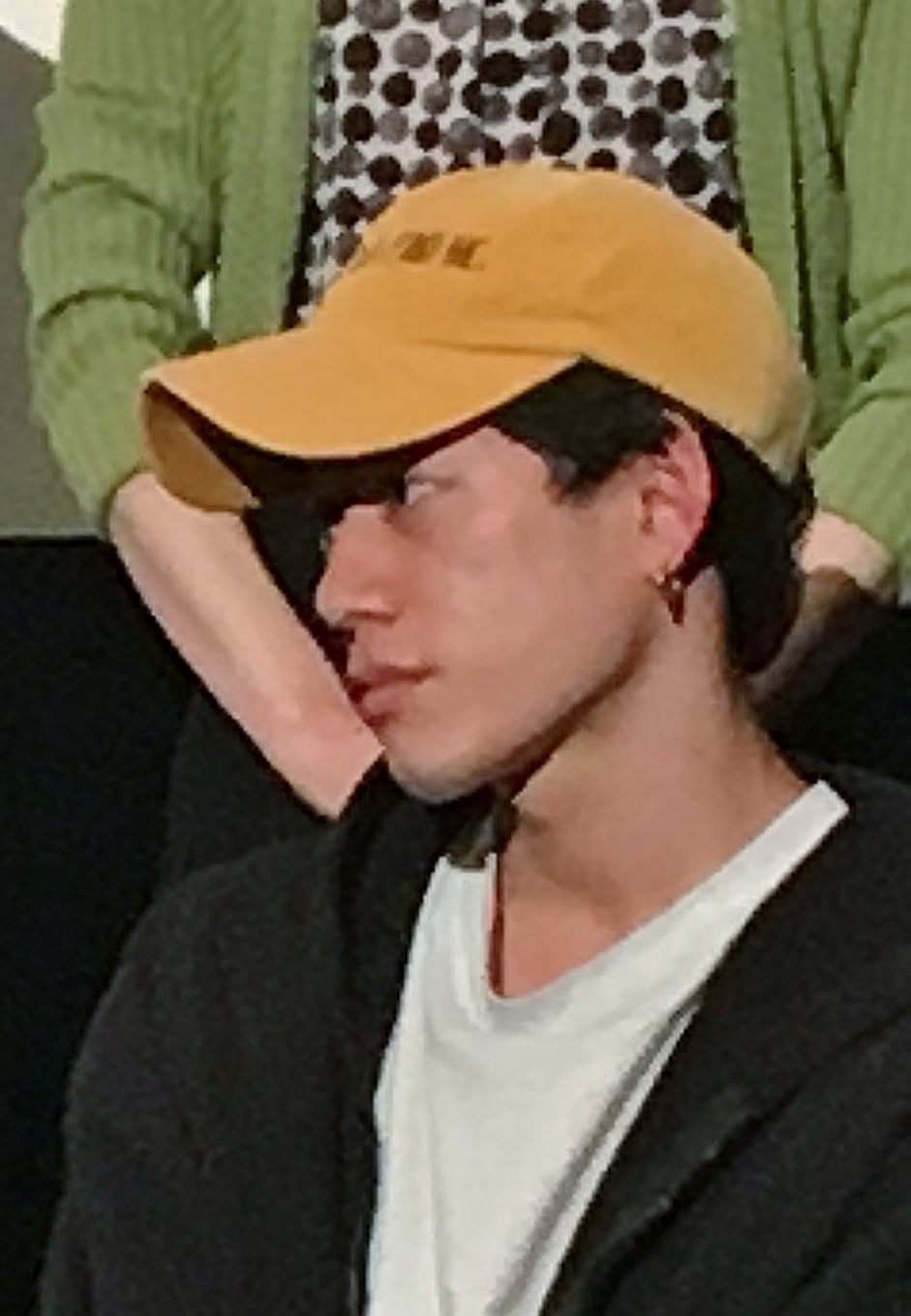 髙橋雄祐（高橋雄祐） （2018年11月15日、新宿K's cinema） 「あいが、そいで、こい」舞台挨拶にて